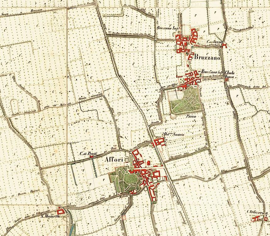 I nuclei urbani di Affori e Bruzzano dei due Borghi, nella carta di manovra del nord Milano dell'IGM